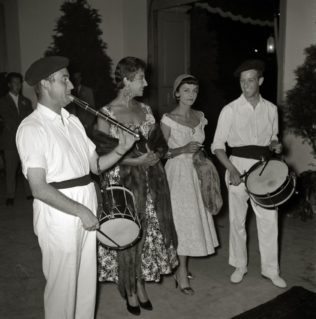 Título original: Festival de Cine de San Sebastián (94/110) Localización: San Sebastián (Guipúzcoa)